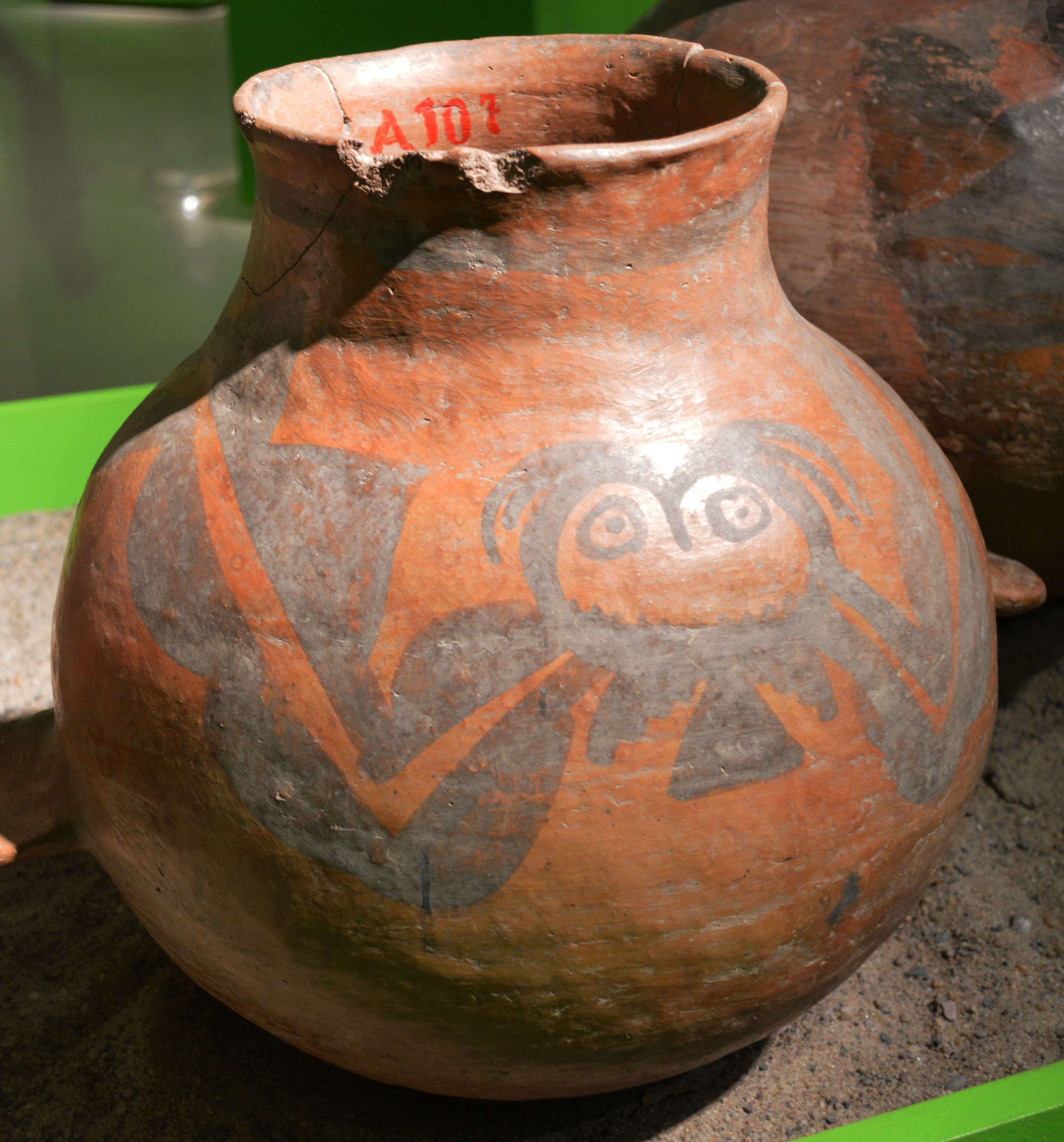 Alfarería indígena